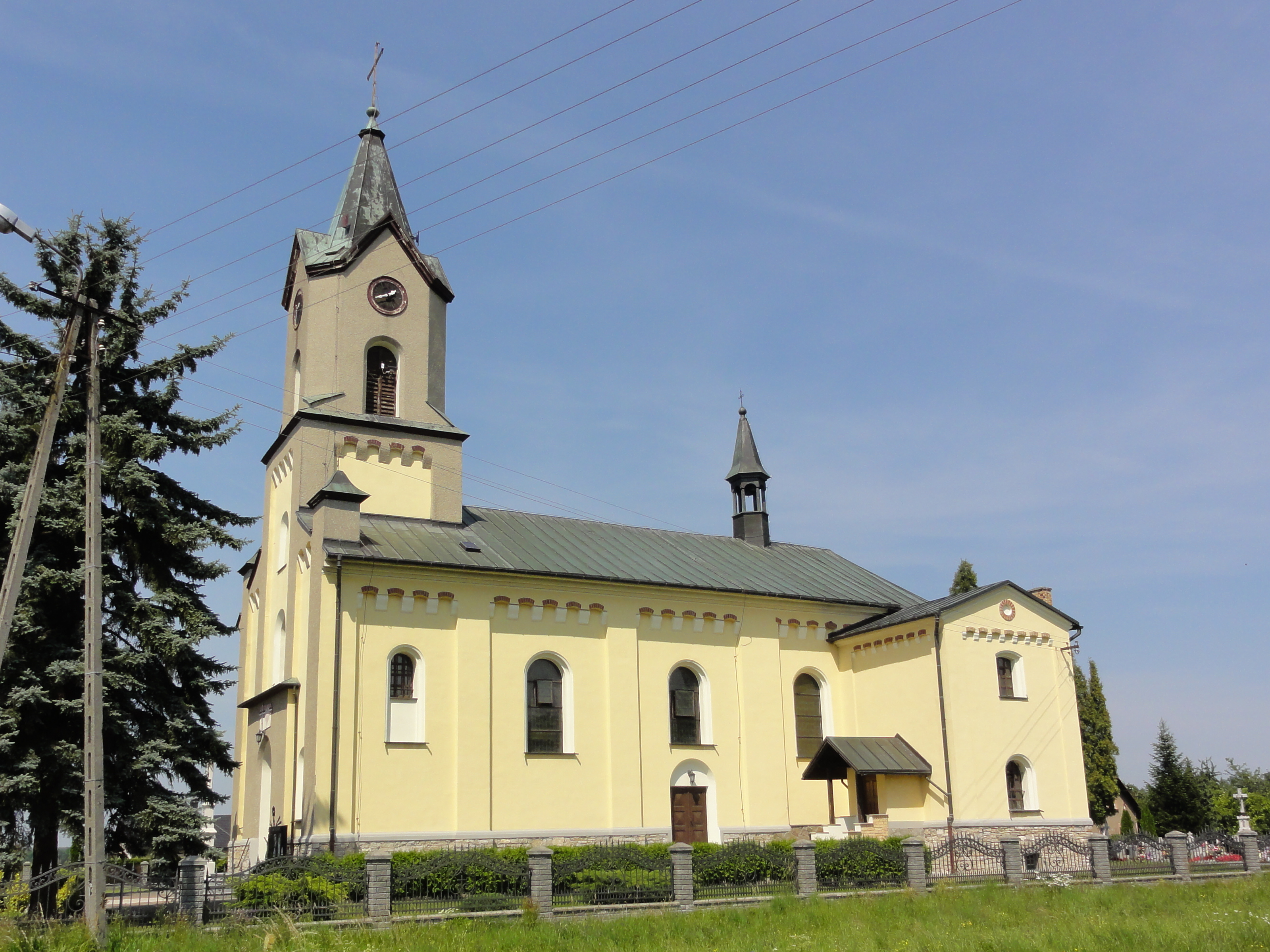 Kościół Najświętszego Serca Pana Jezusa w Bronowie